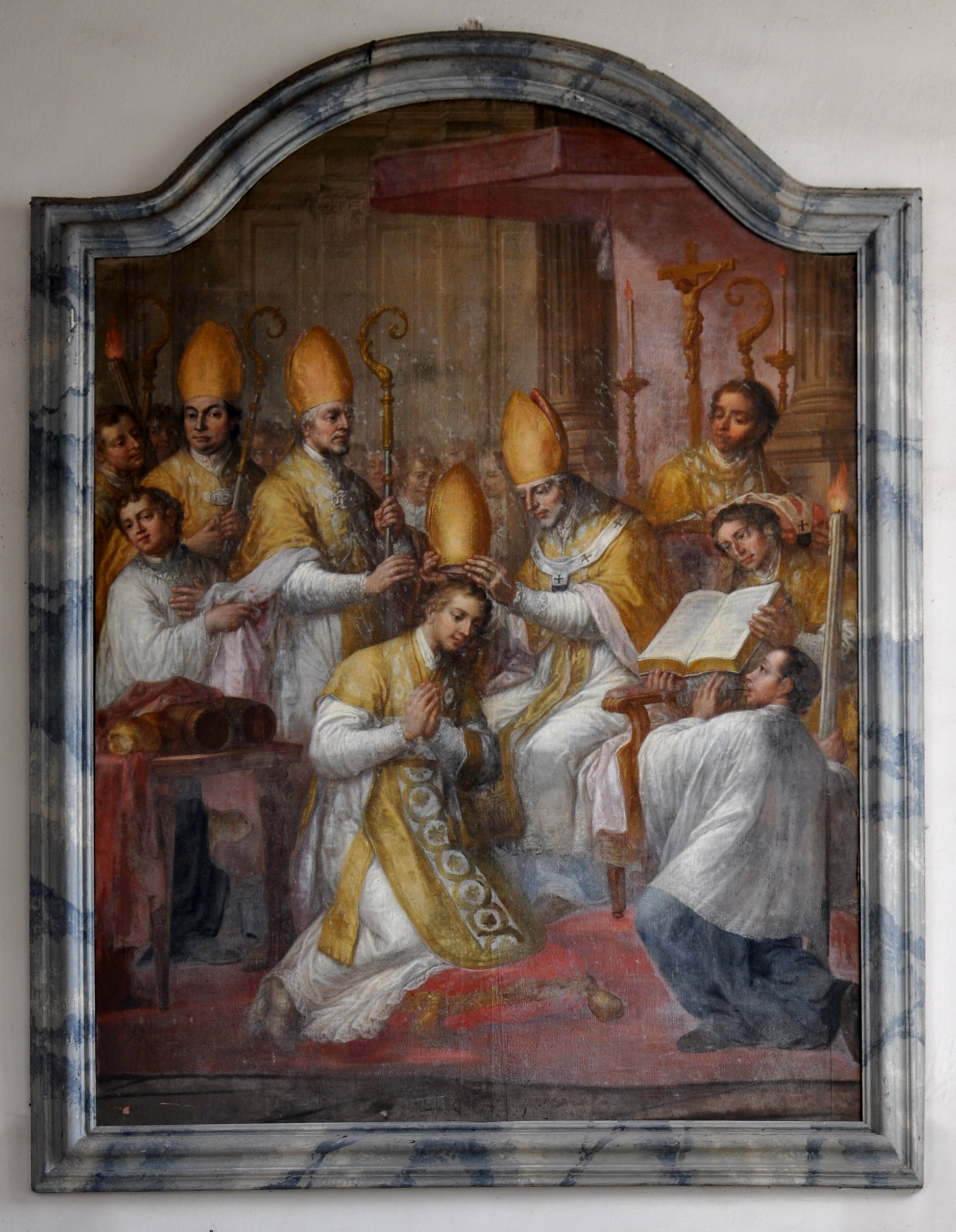 Weißenau, ehem. Klosterkirche (heute Pfarrkirche St. Peter und Paul), Tafelbild von Andreas Brugger: „Der hl. Norbert wird zum Erzbischof geweiht“